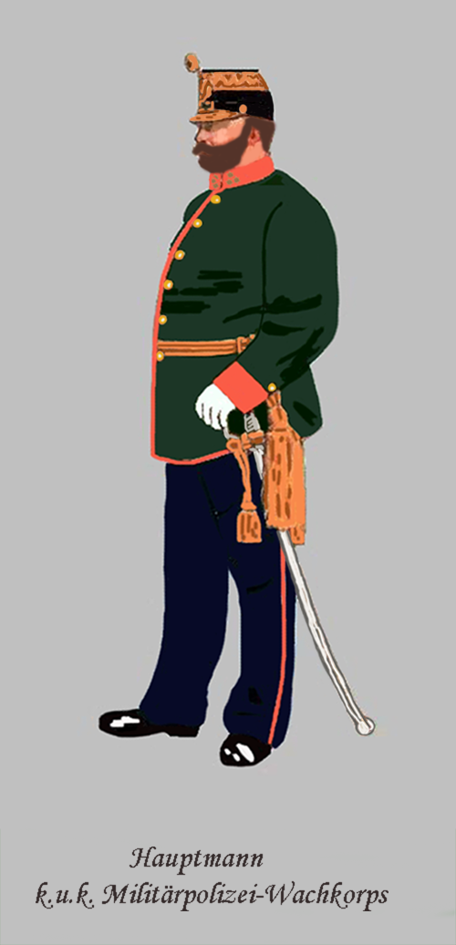 Hauptmann des k.u.k. Militärpolizeiwachkorps en Parade